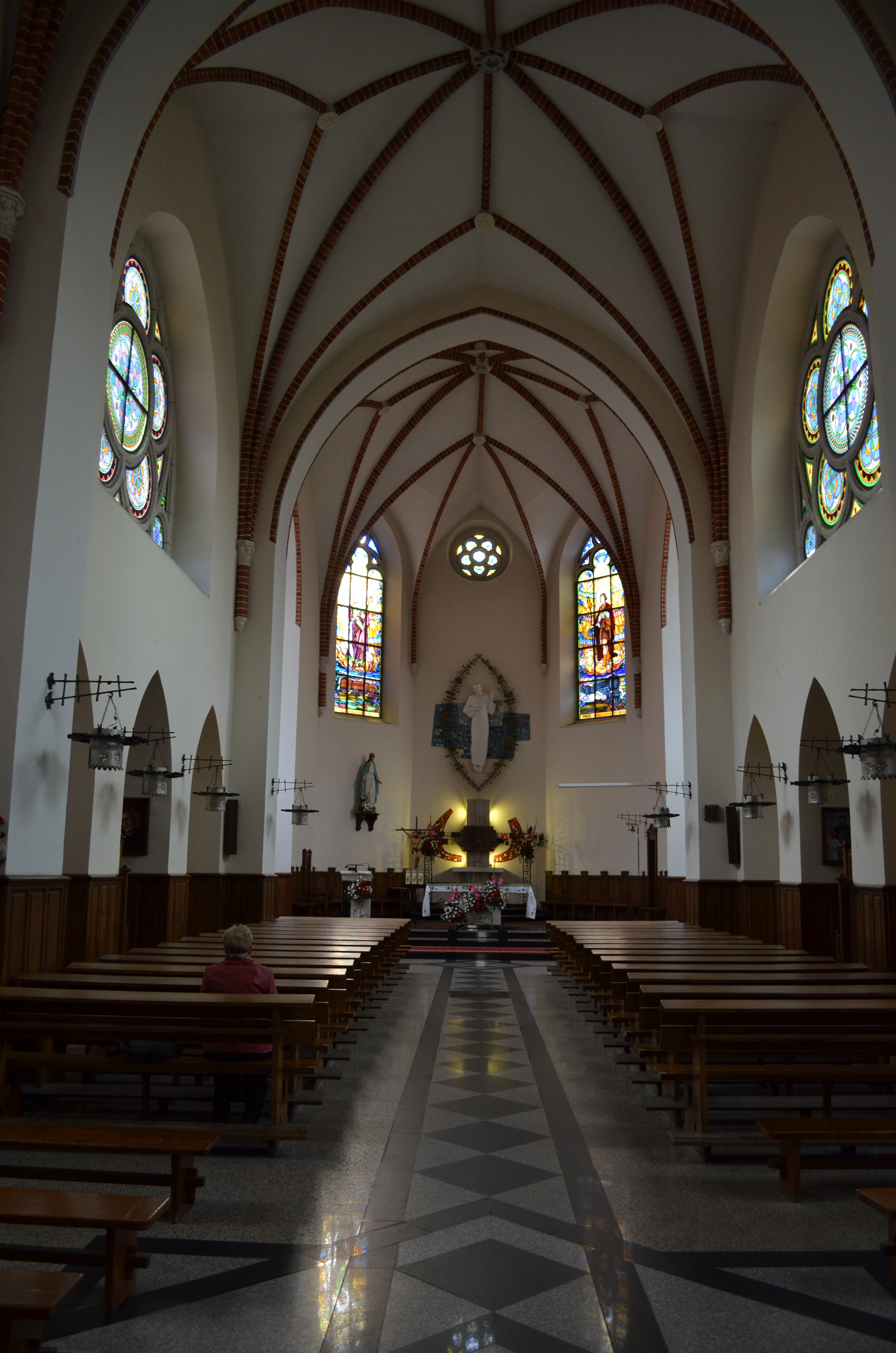 Nowy Sącz, ul. Batorego. Kościół p.w. Najśw. Serca Jezusa.